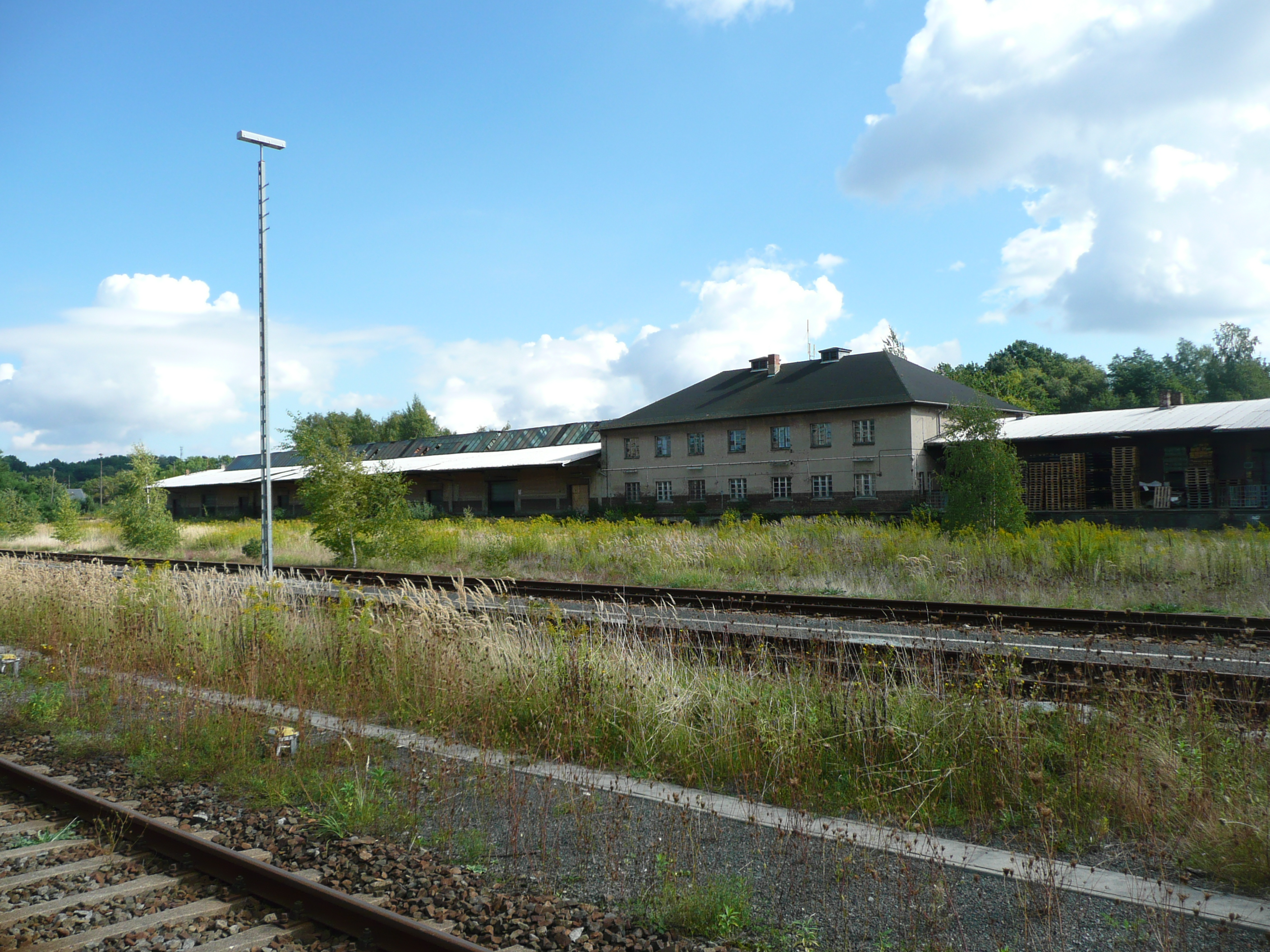 ehemaliger Güterschuppen des Bahnhofes Ebersbach (2015)